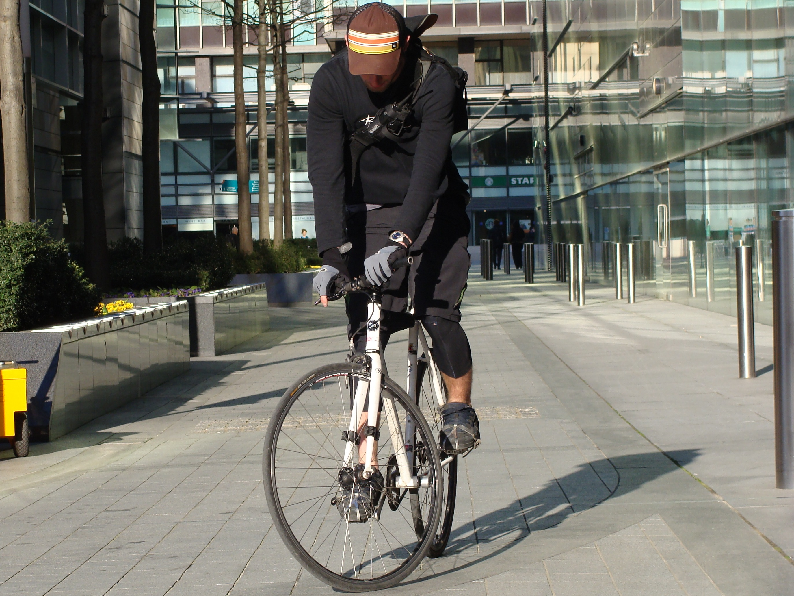 London bicycle courier